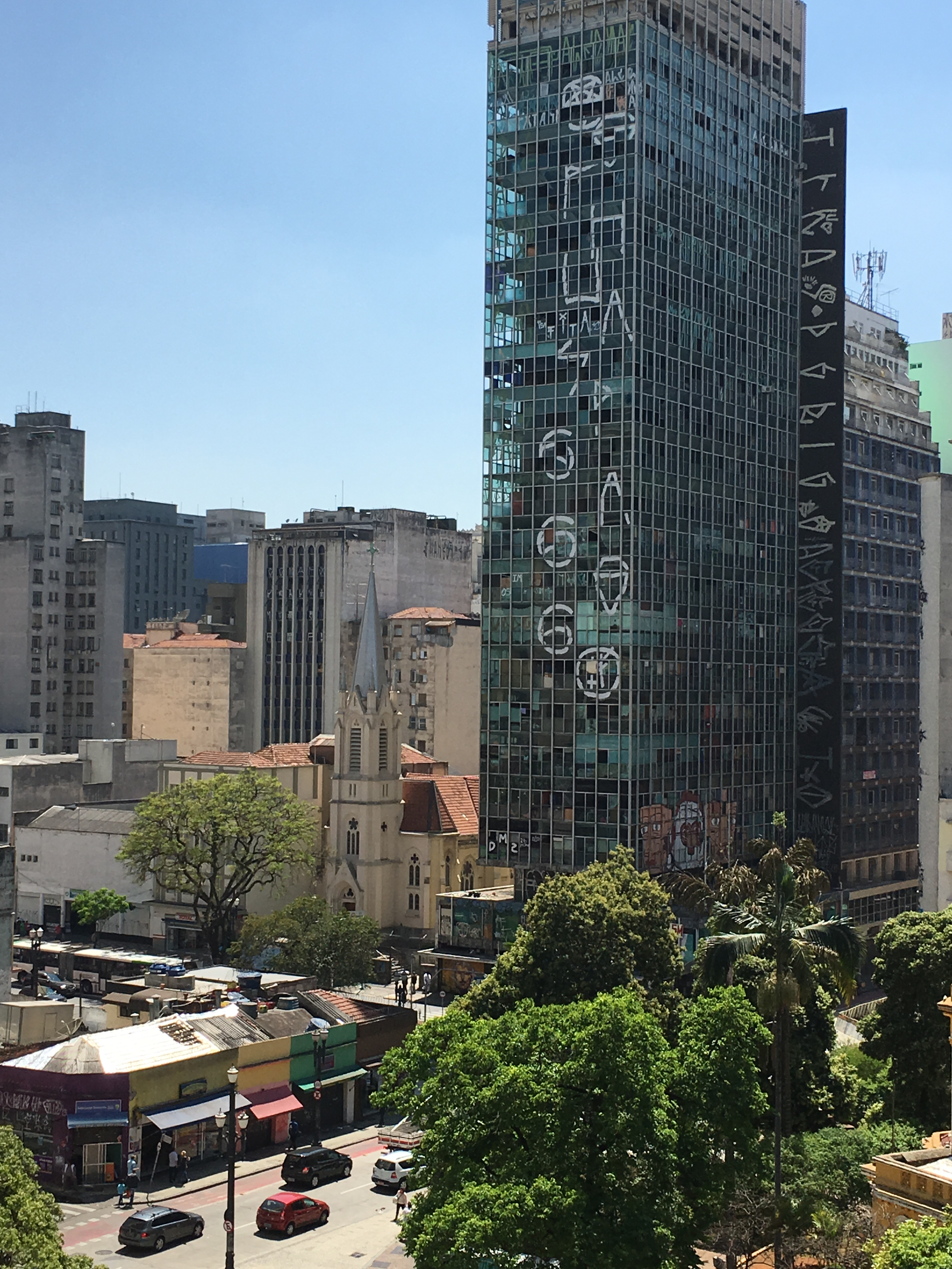 A Igreja Luterana Martin Luther, no Largo do Paissandu, vista do quarto andar da Galeria do Rock (Shopping Center Grandes Galerias), ao lado de um edifício abandonado e ocupado (São Paulo-SP, Brasil).